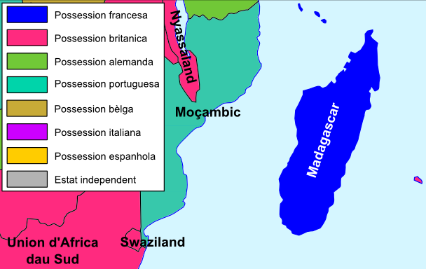 Madagascar durant lo periòde coloniau (1914).